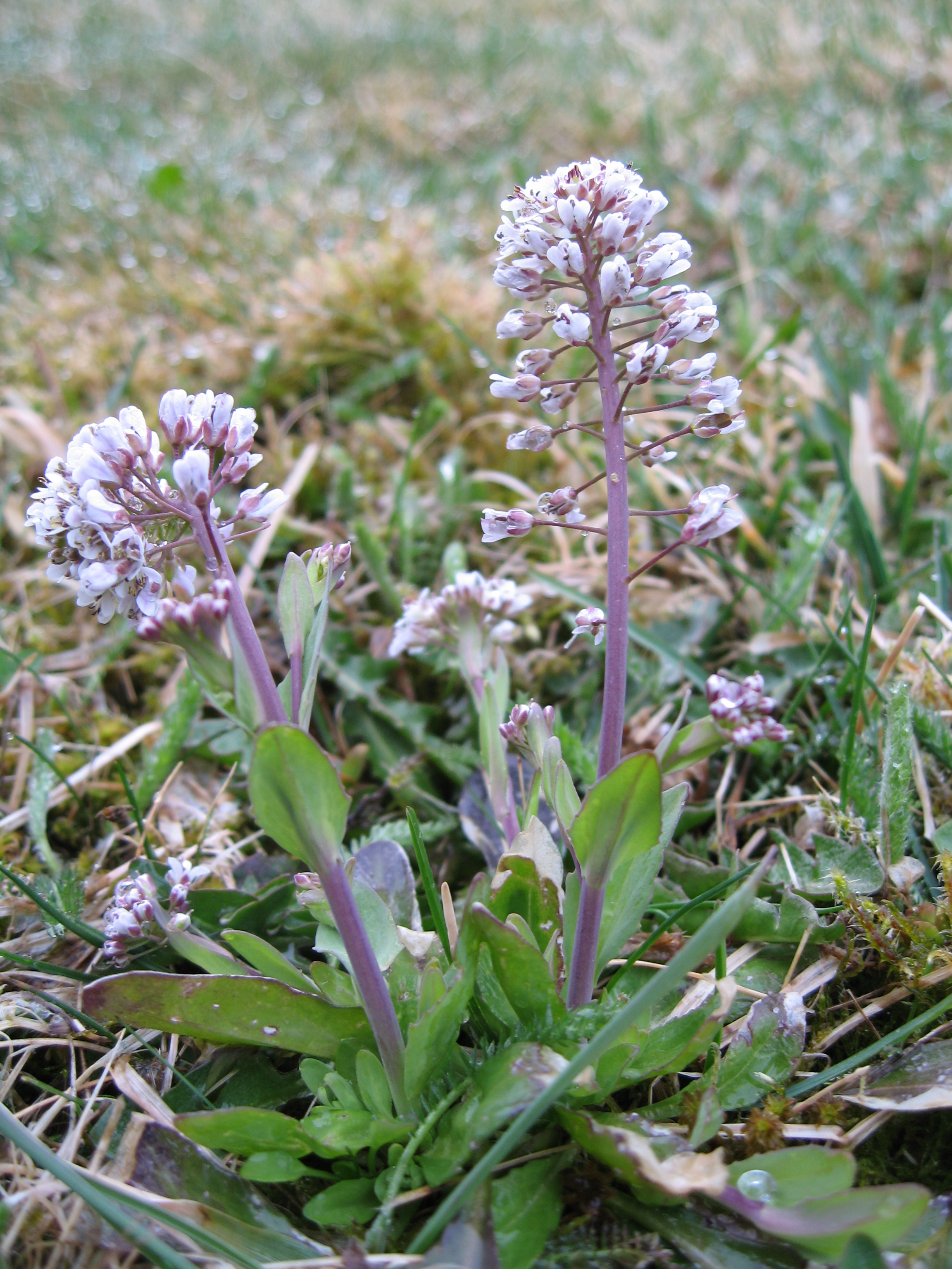 Thlaspi alpestre